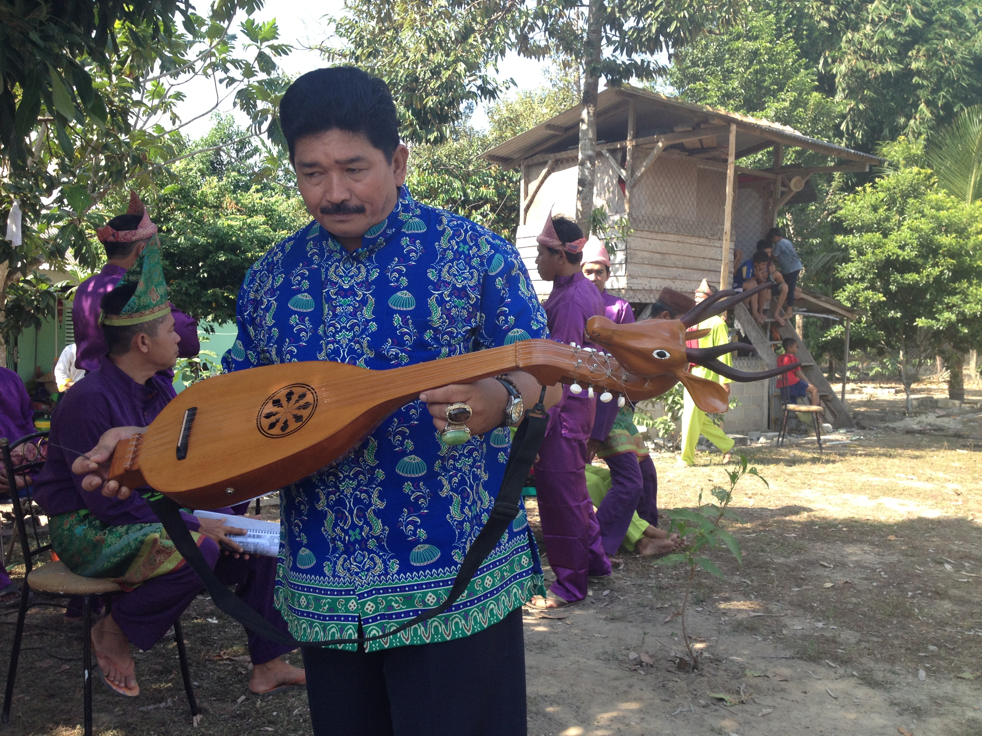 Alat Musik Dambus